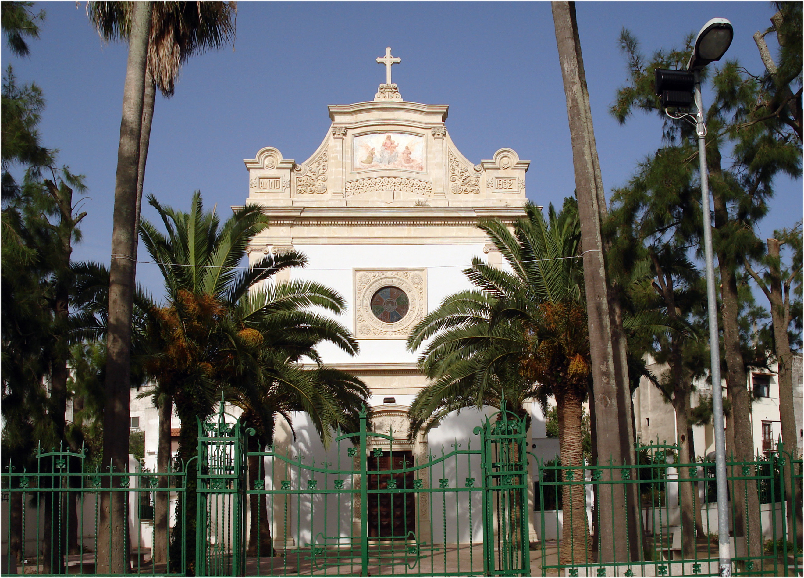 Esterno del santuario dedicato alla Madonna della Neve. Neviano (Le)